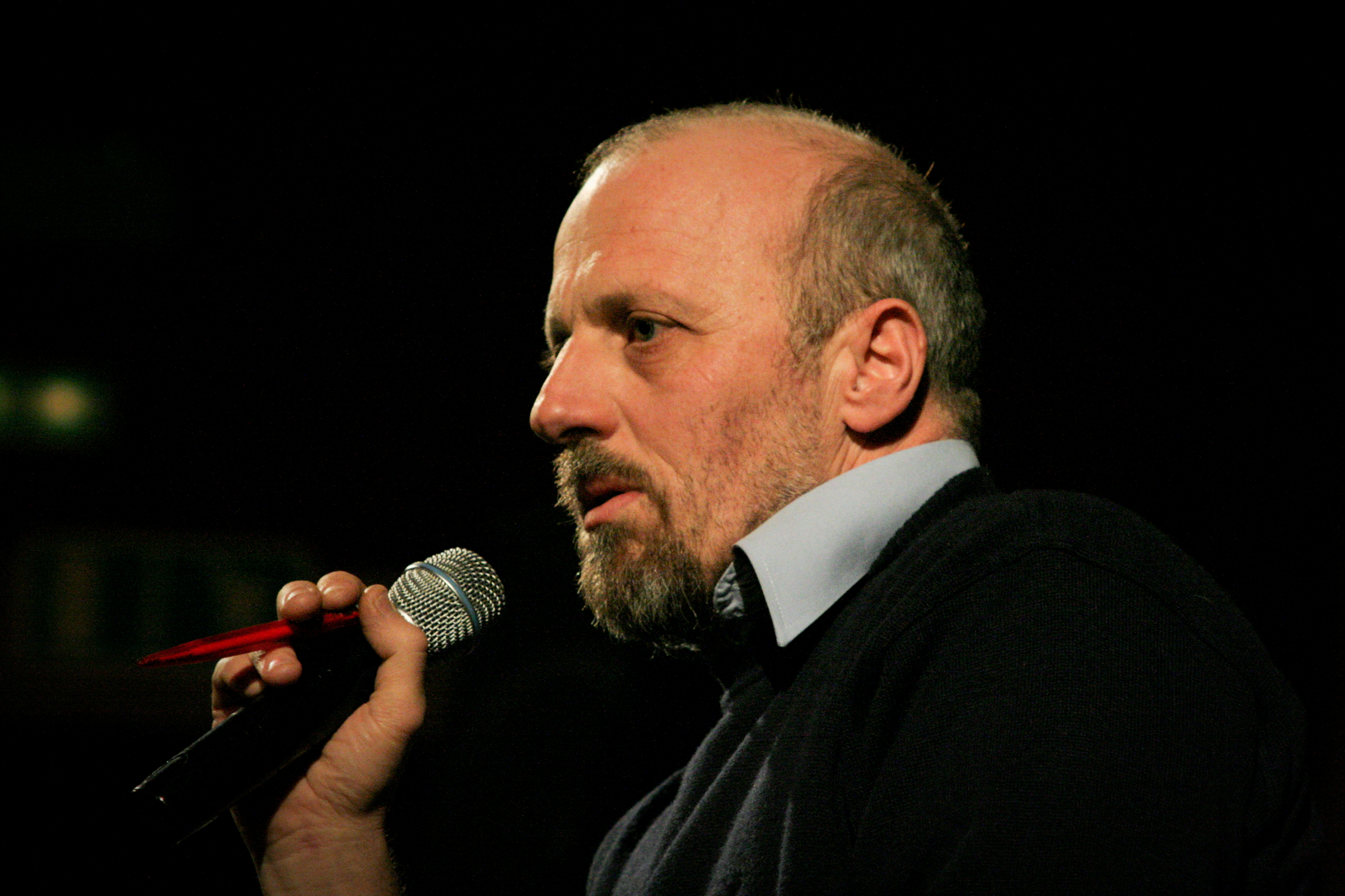 Teatro Puccini, Novoli, (Firenze)